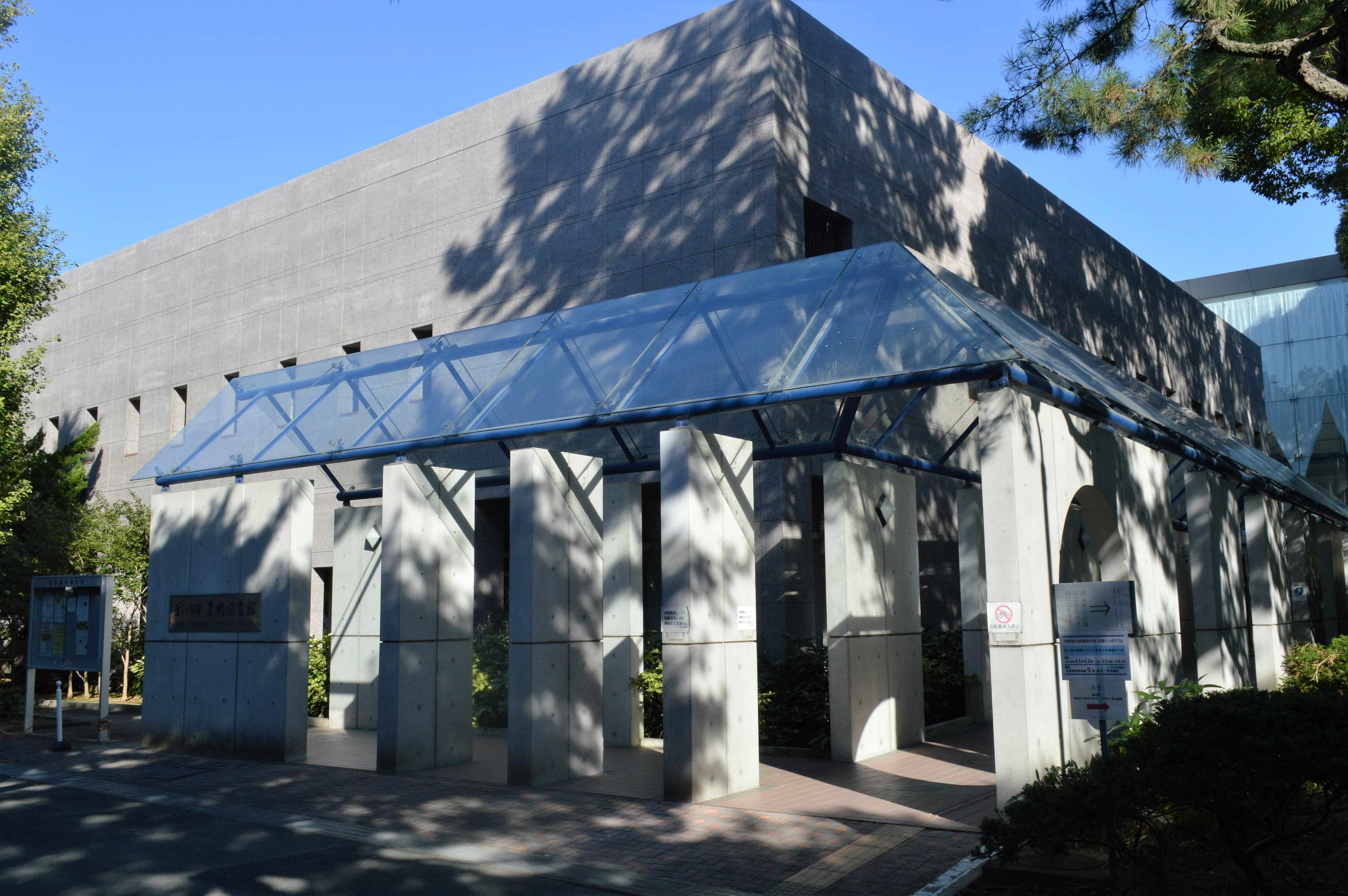 愛知大学豊橋キャンパスにある附属図書館（愛知大学図書館豊橋図書館）。